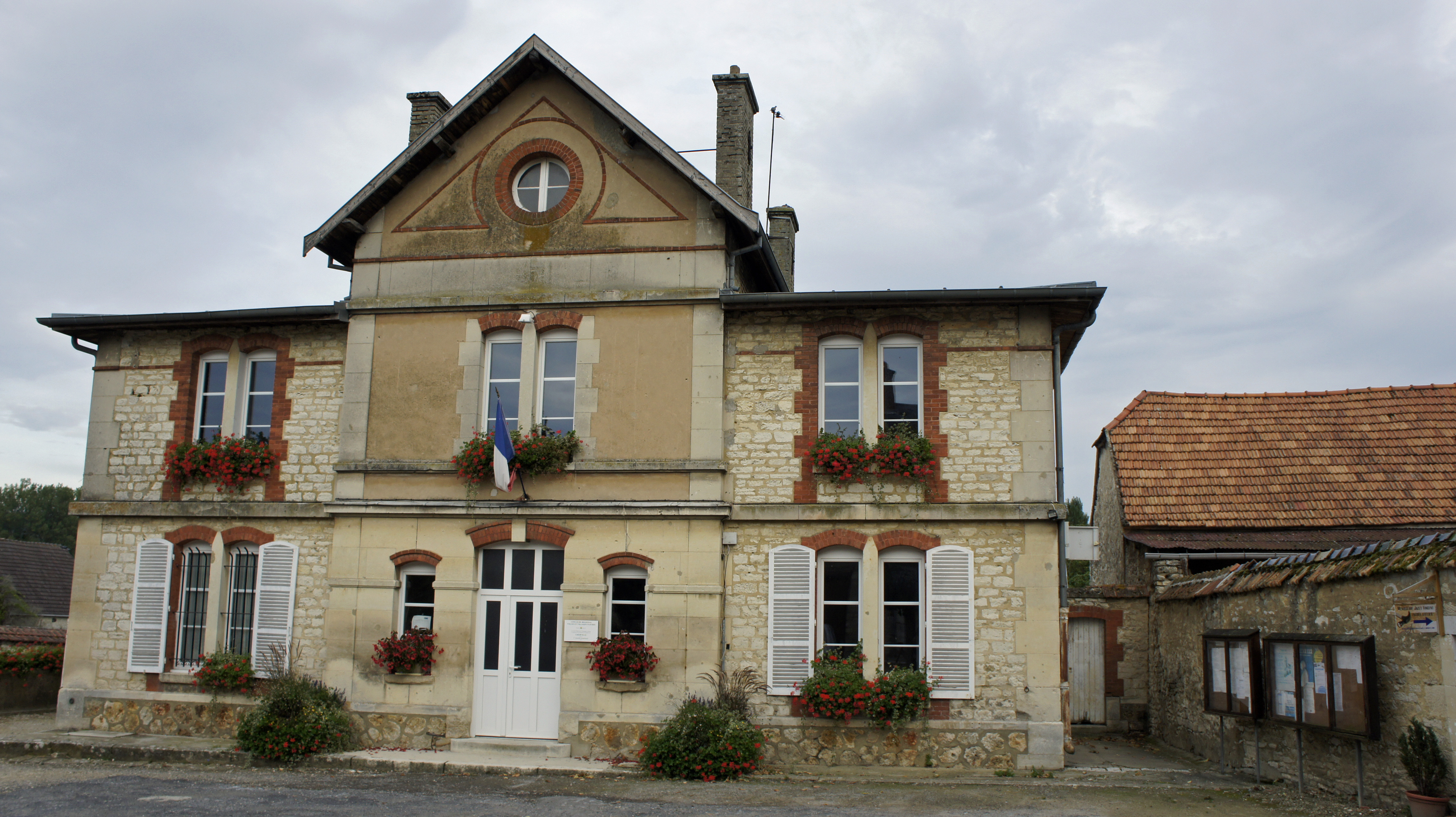 Vue de la mairie de Courville.